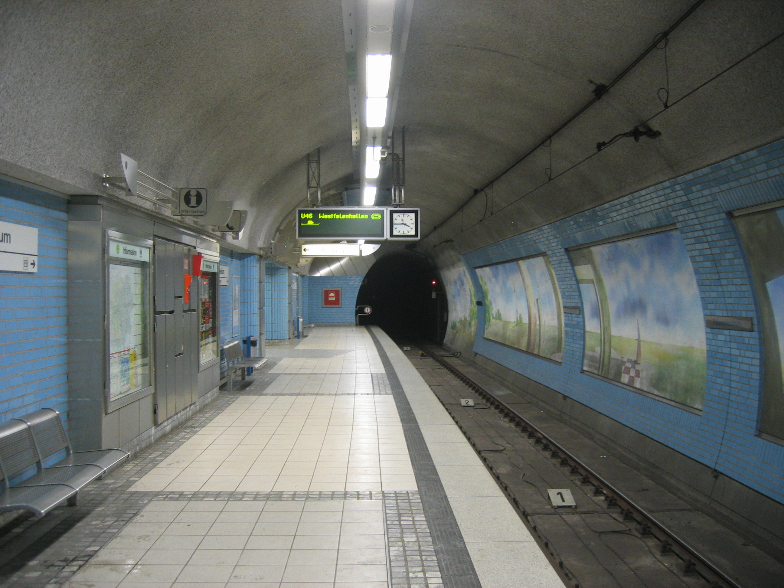 U-Bahnhof Polizeipräsidium der Stadtbahn Dortmund